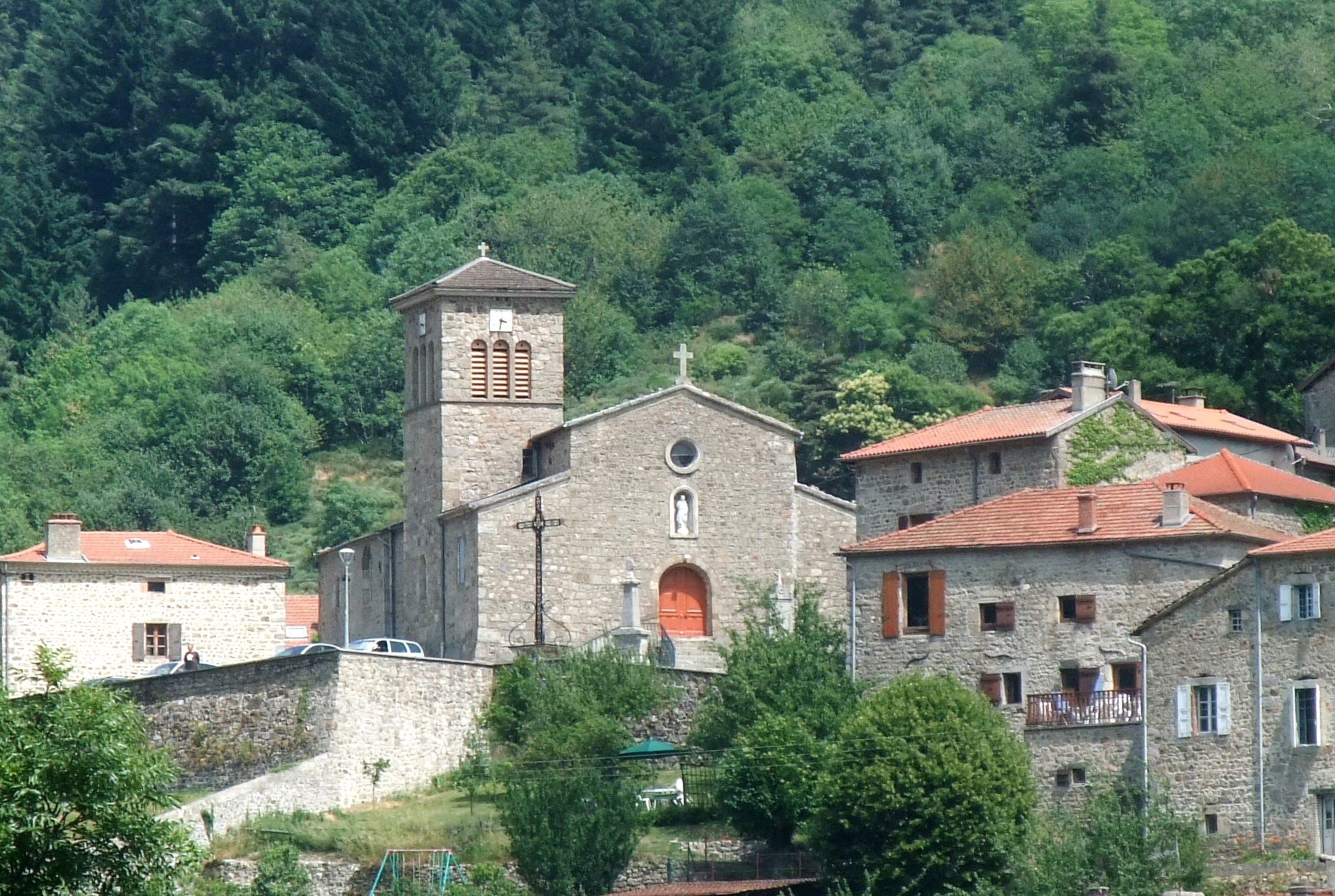 Saint-Julien-Vocance église et maisons